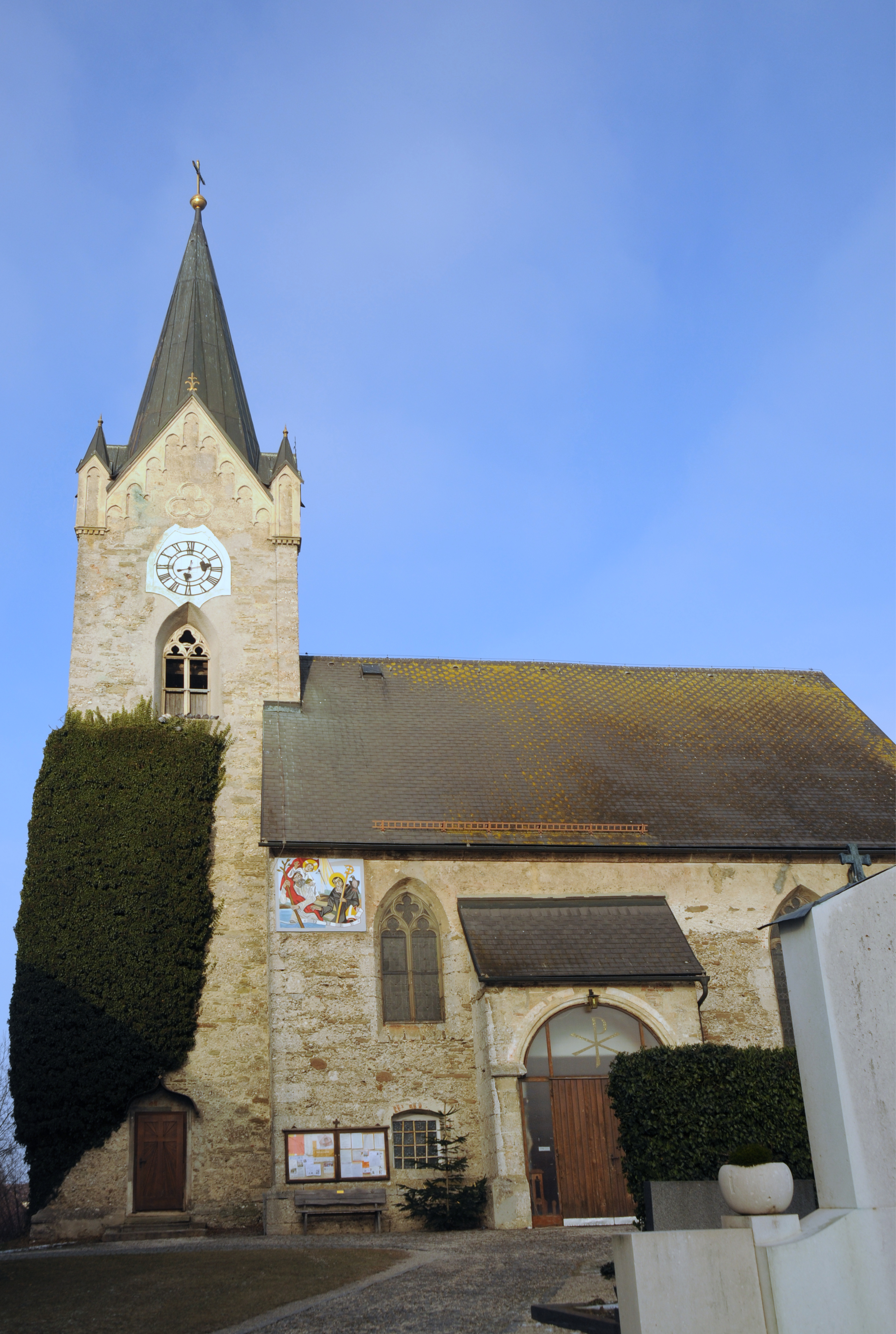 Kath. Pfarrkirche hl. Erasmus und Friedhof